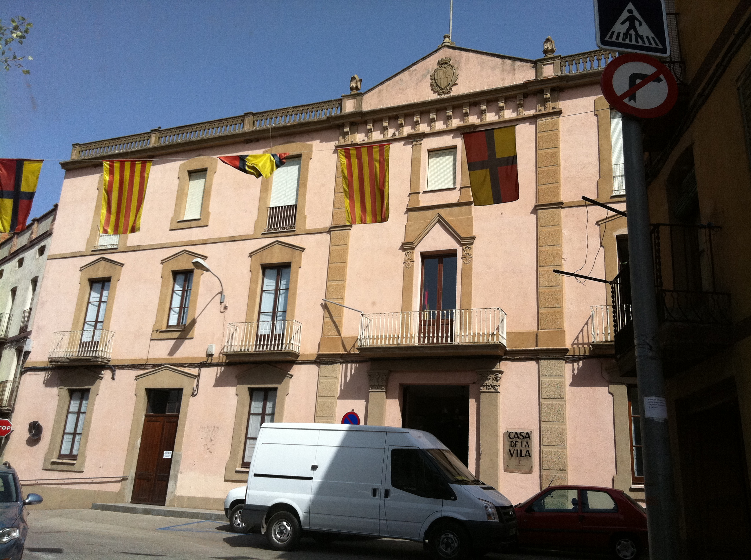 Artés Casa de la Vila d'Artés